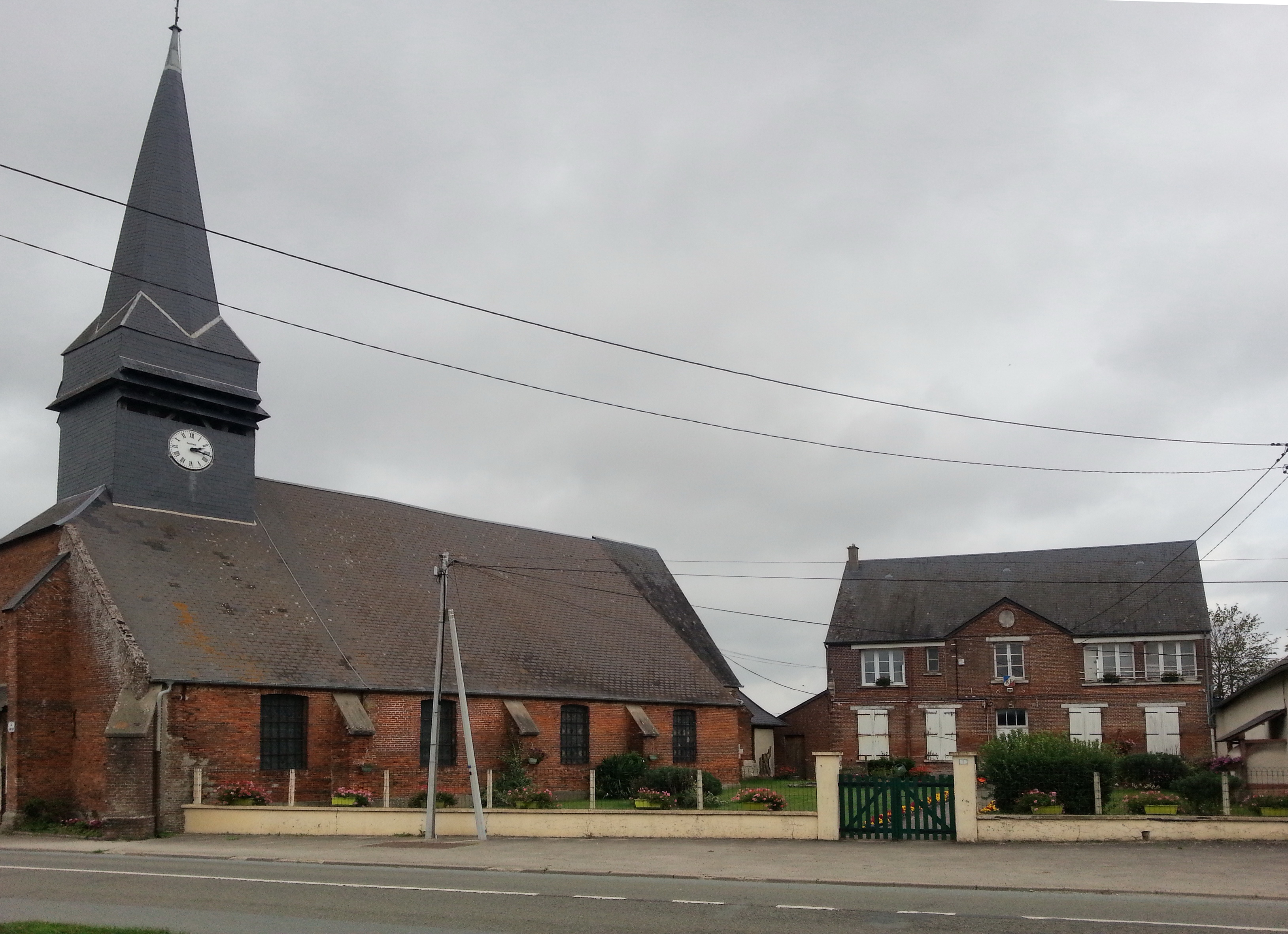 La Mairie et l'Eglise de Fouilloy